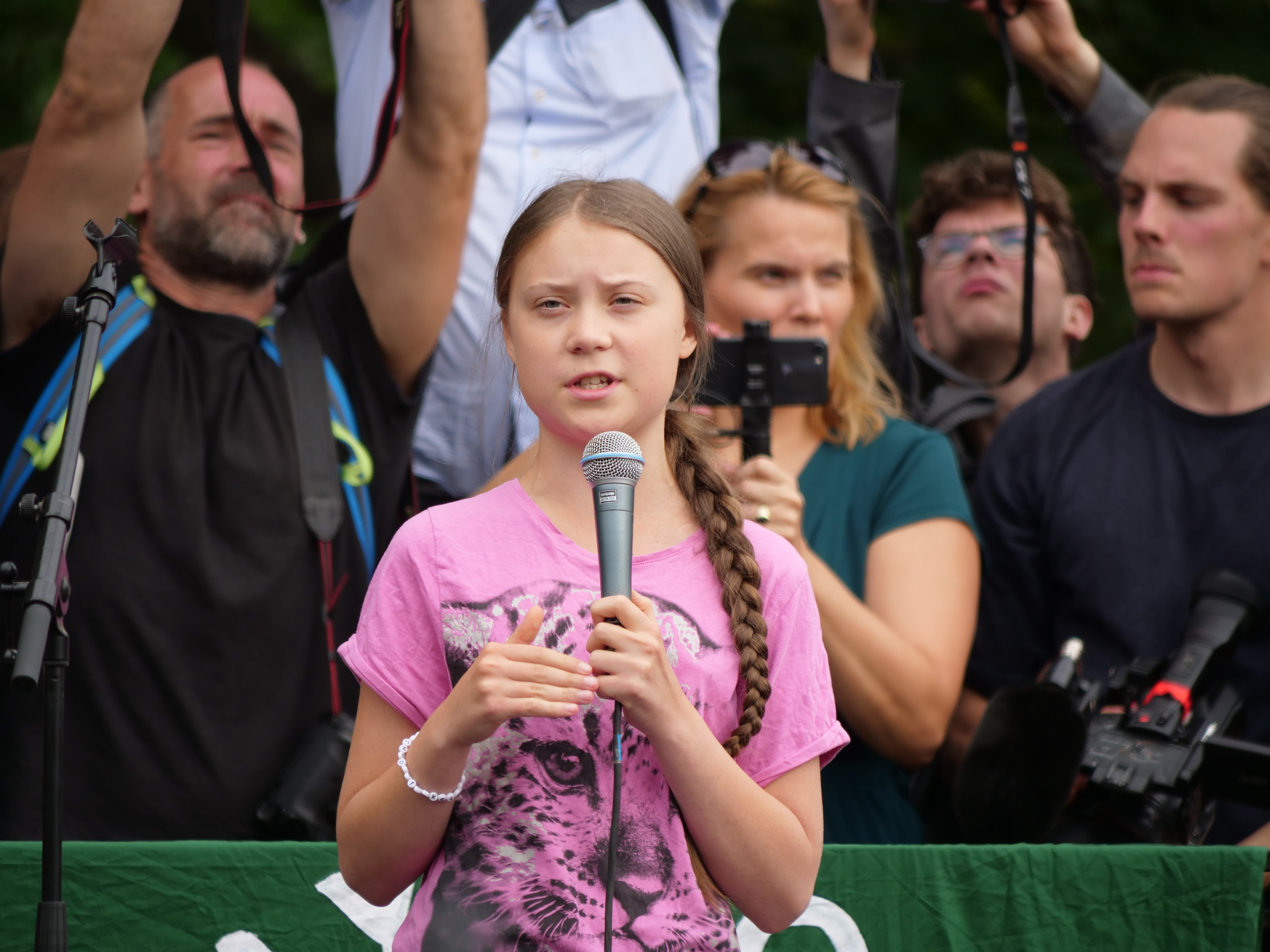 FridaysForFuture Kundgebung im Invalidenpark in Berlin am 19. Juli 2019.